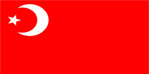 Азербайджанская Социалистическая Советская Республика была провозглашена при установлении советской власти в г.Баку 28 апреля 1920 года. По мнению известного советского флаговеда Л.Н.Стрельцова, ссылавшегося на архив К.И.Дунина-Барковского, наряду с красными революционными флагами первое время неофициально употреблялся и красный флаг с изображением в верхнем крыже у древка белой 5-конечной звезды и белым полумесяцем, обращенным к древку. Например, такой флаг изображен на плакате, посвященном запрету многоженства, выпущенном в г.Баку в 1921 году.